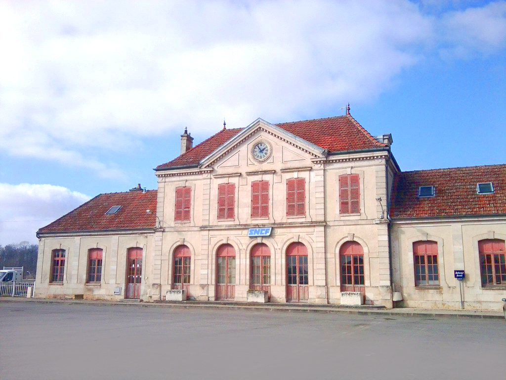 Gare de Châtillon-sur-Seine, côté place.